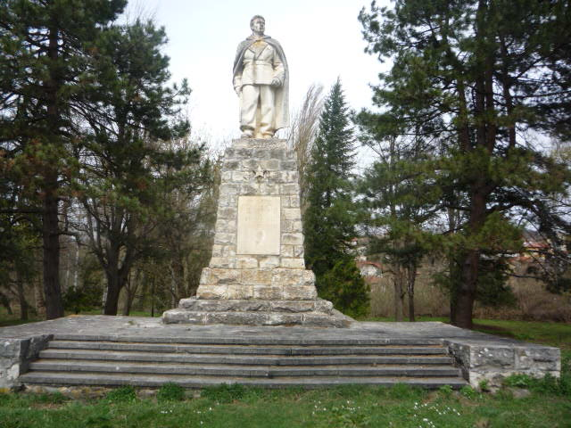 Паметник на Стоян Едрев - с. Радювене, обл. Ловеч